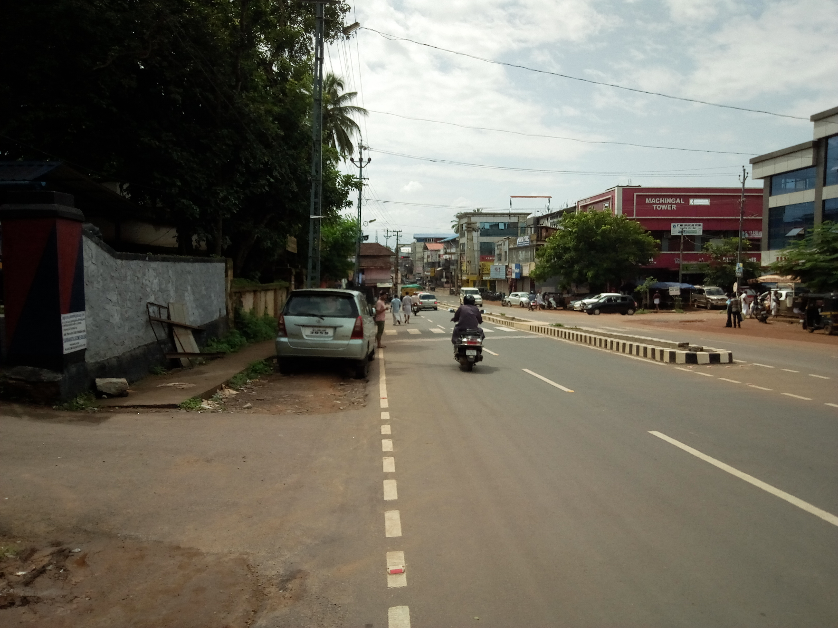 വണ്ടൂര്‍ അങ്ങാടിയുടെ ചിത്രം- മഞ്ചേരി റോഡില്‍ നിന്നുള്ള ദൃശ്യം